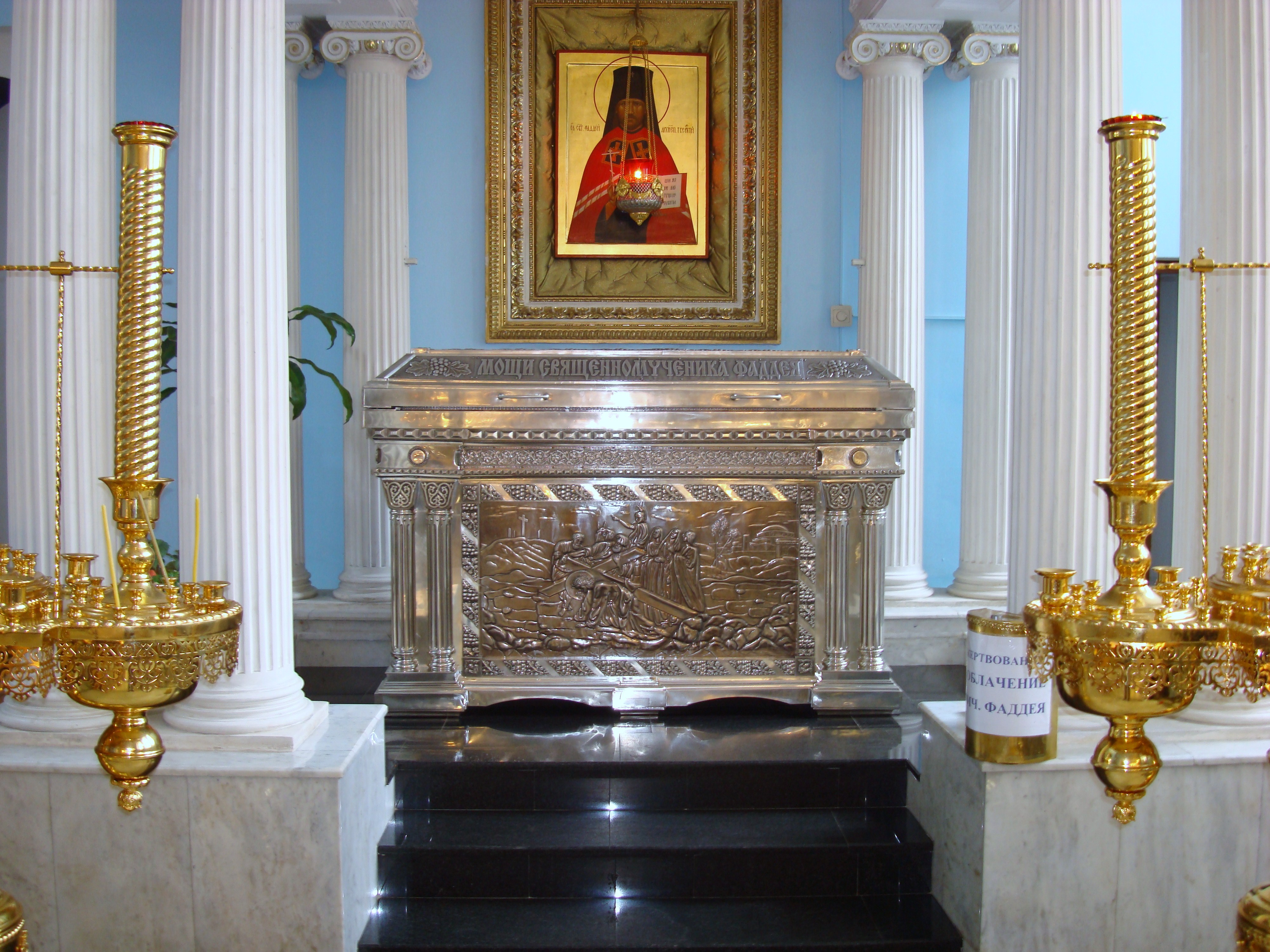 Рака с мощами свщ. мч. Фаддея Тверь Собор Вознесения Господня